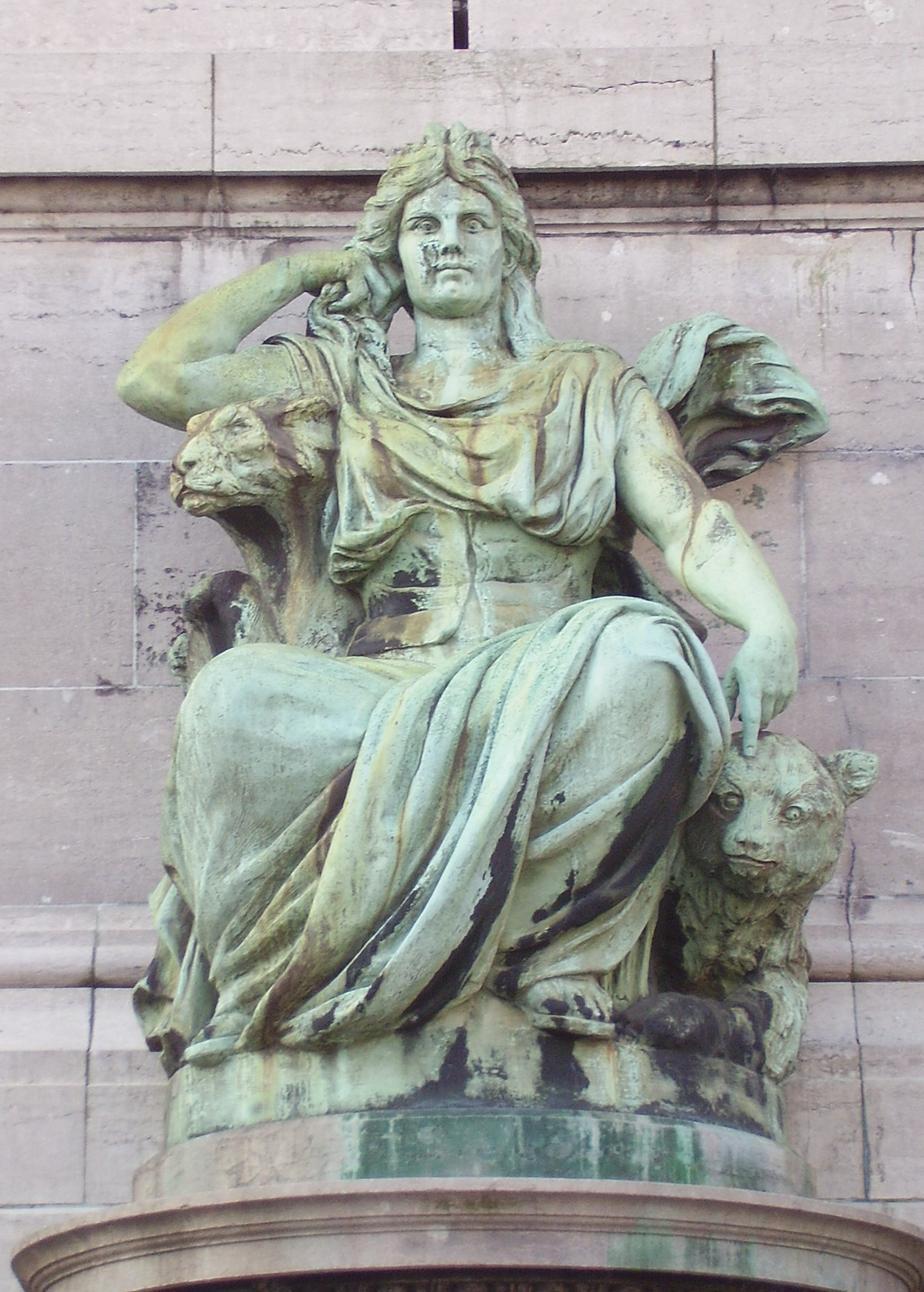 Arcades du Cinquantenaire, Bruxelles - Province de flandre Occidentale par Jef Lambeaux